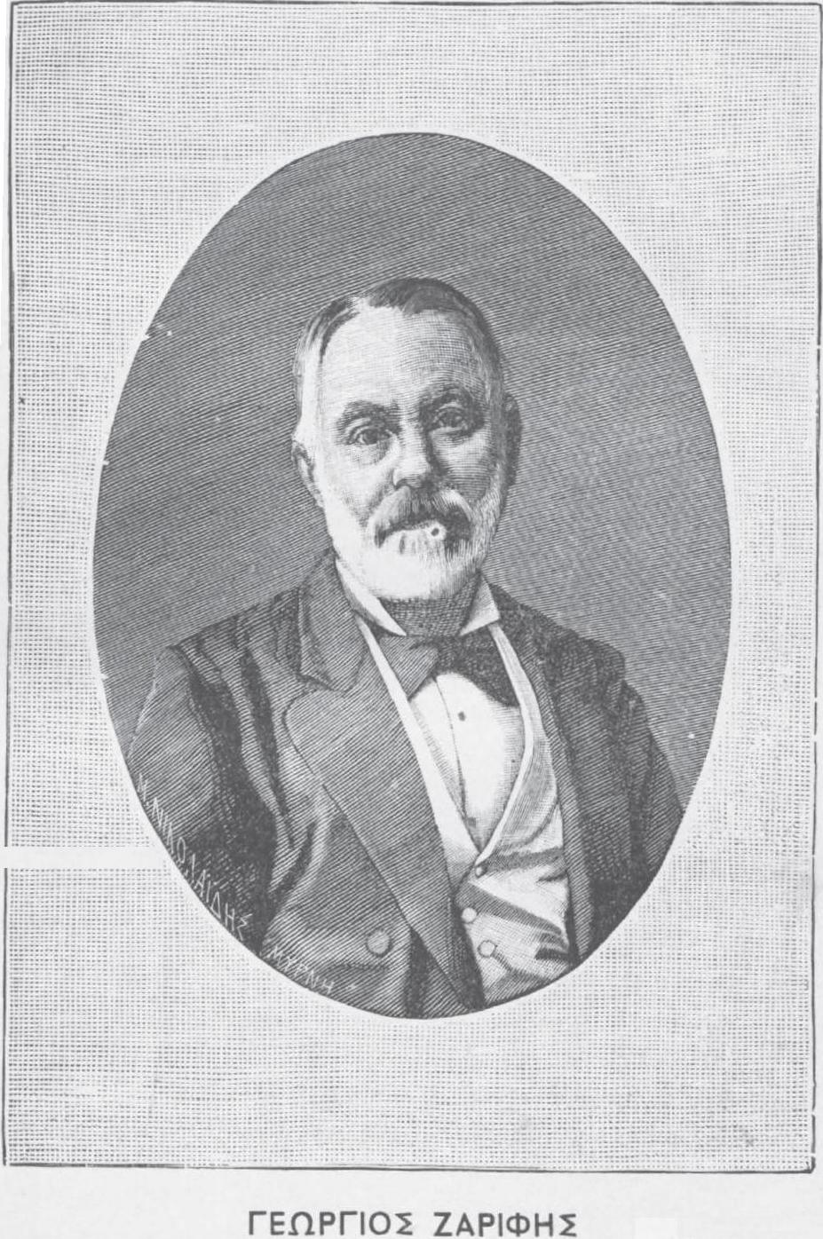 nahmhafte Griechische Persönlichkeit, 19. Jahrhundert